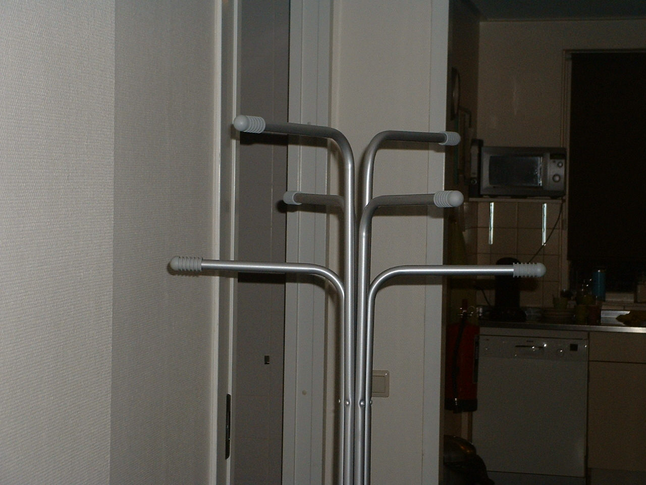 Hutständer